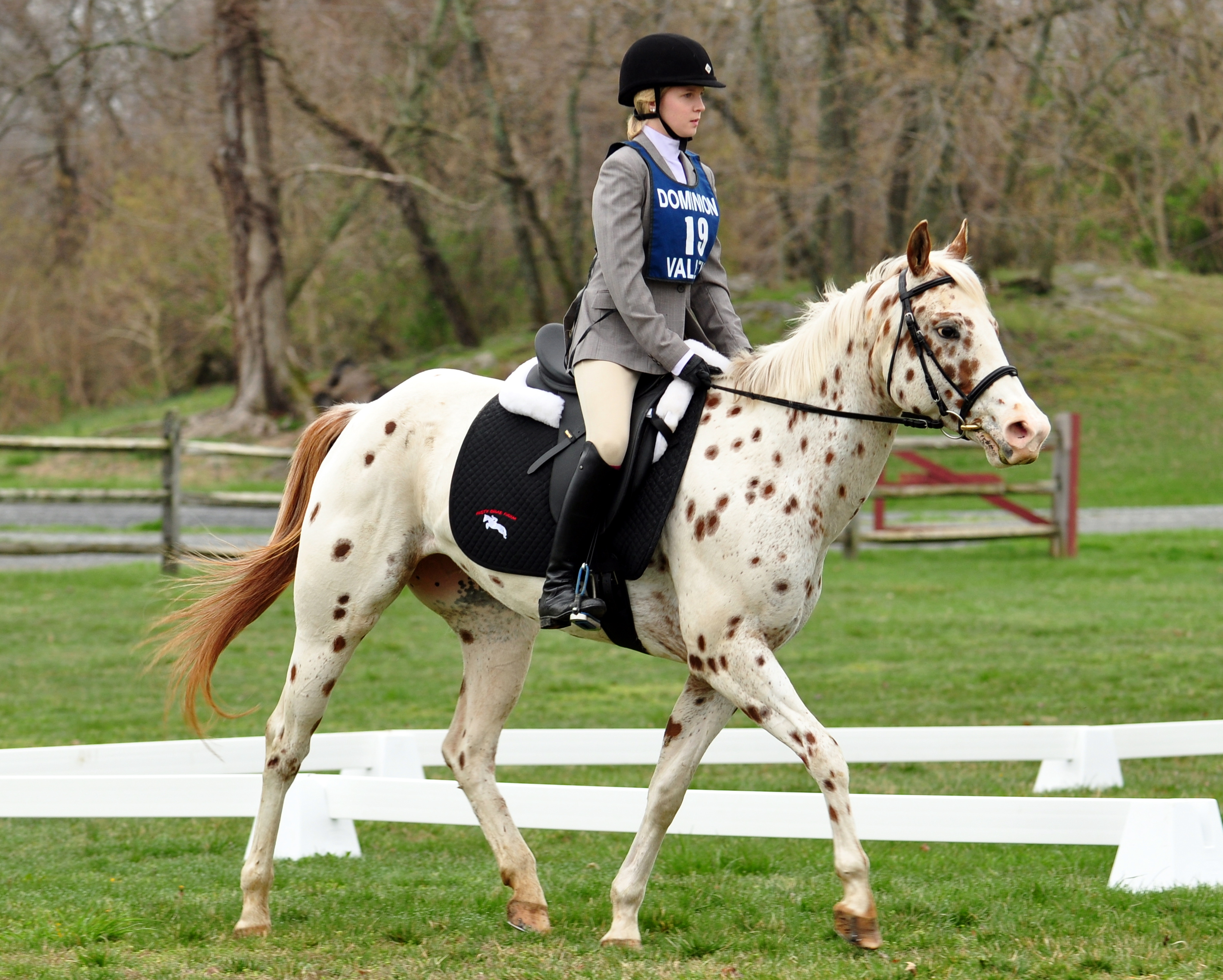 Chestnut leopard pony